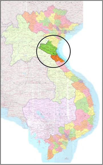 Provinces de Nghê An et de Ha Tinh